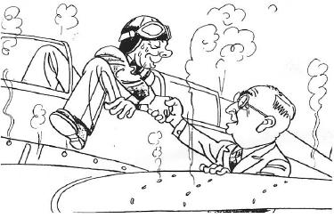 Карикатура на Удета и национальный рекорд скорости установленный на Не 100V2